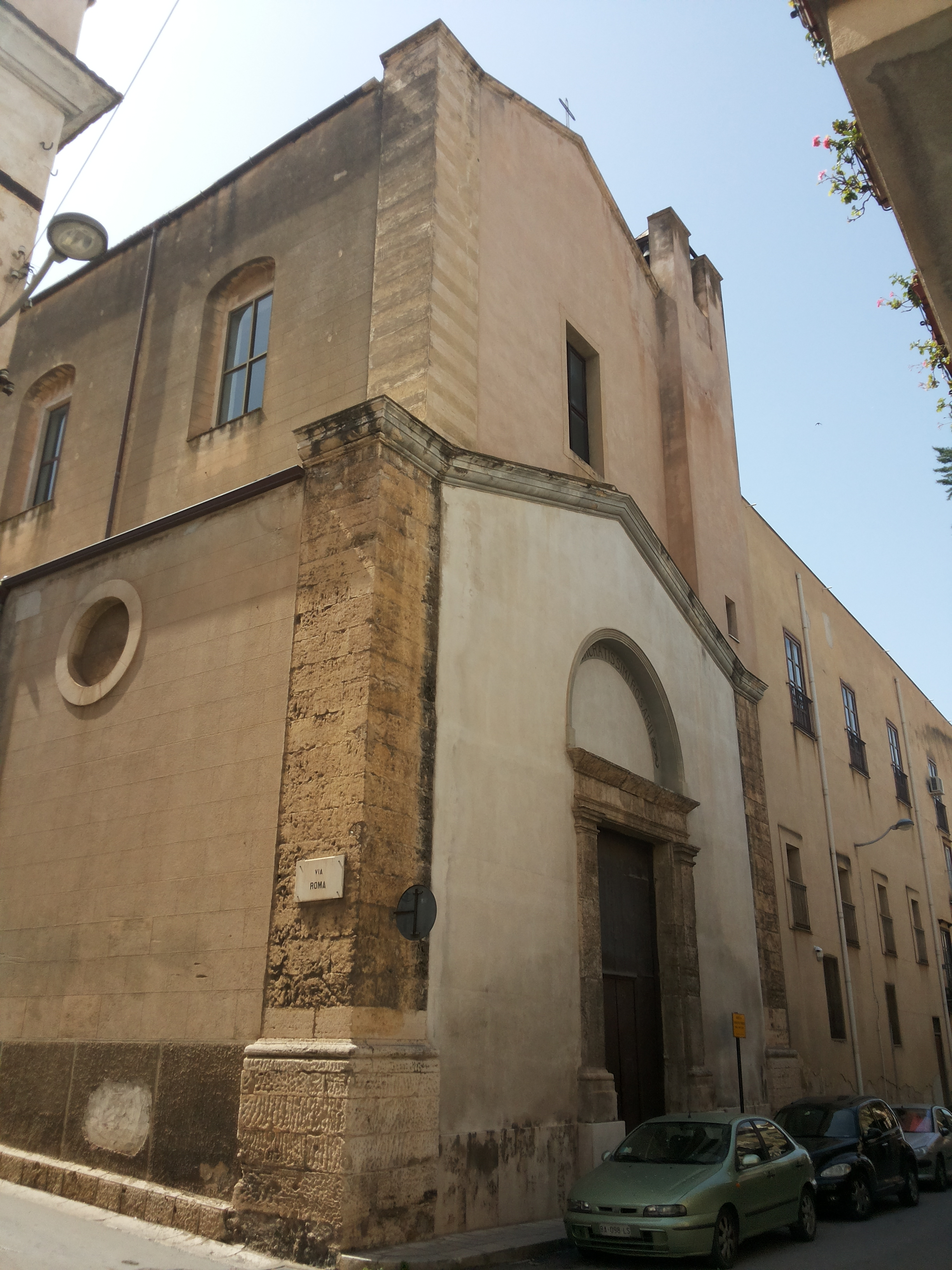 Chiesa del Rosario, Alcamo